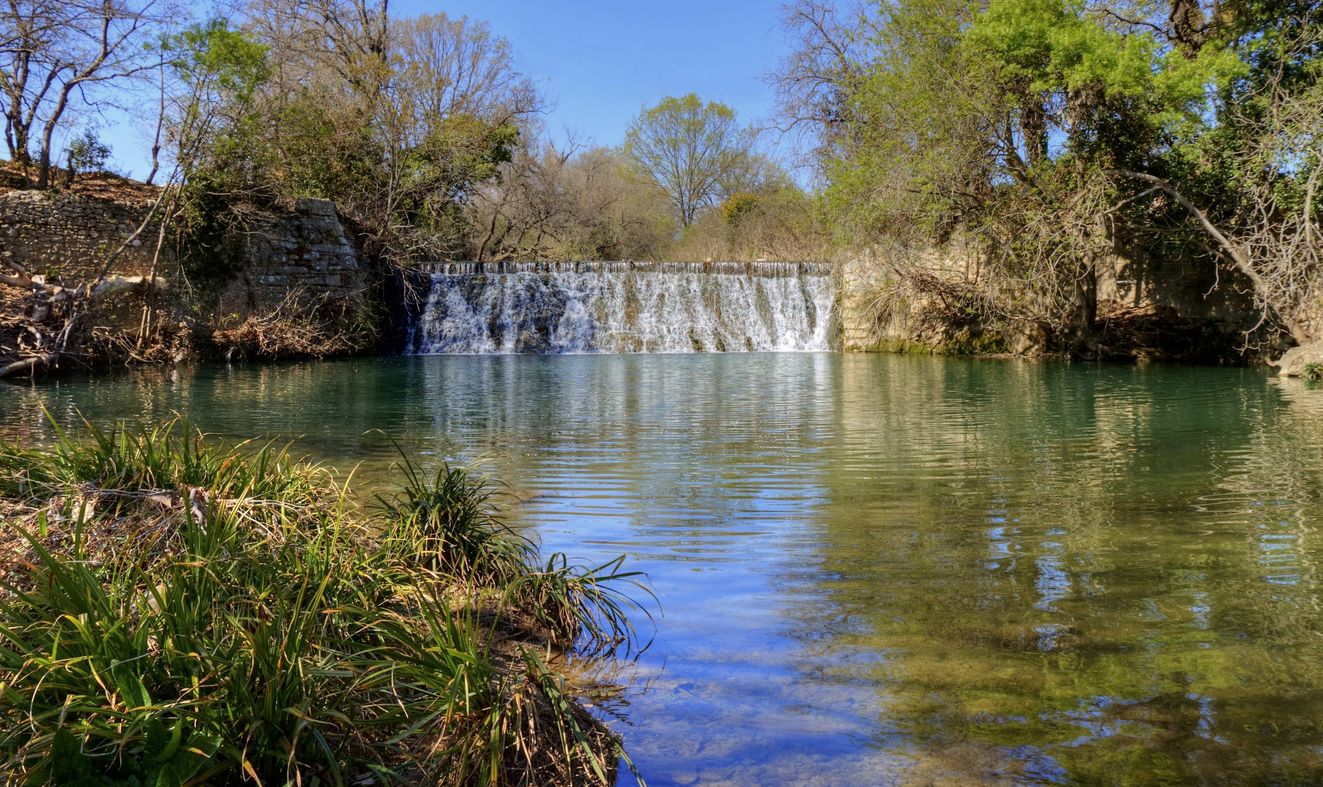 Le Salaison